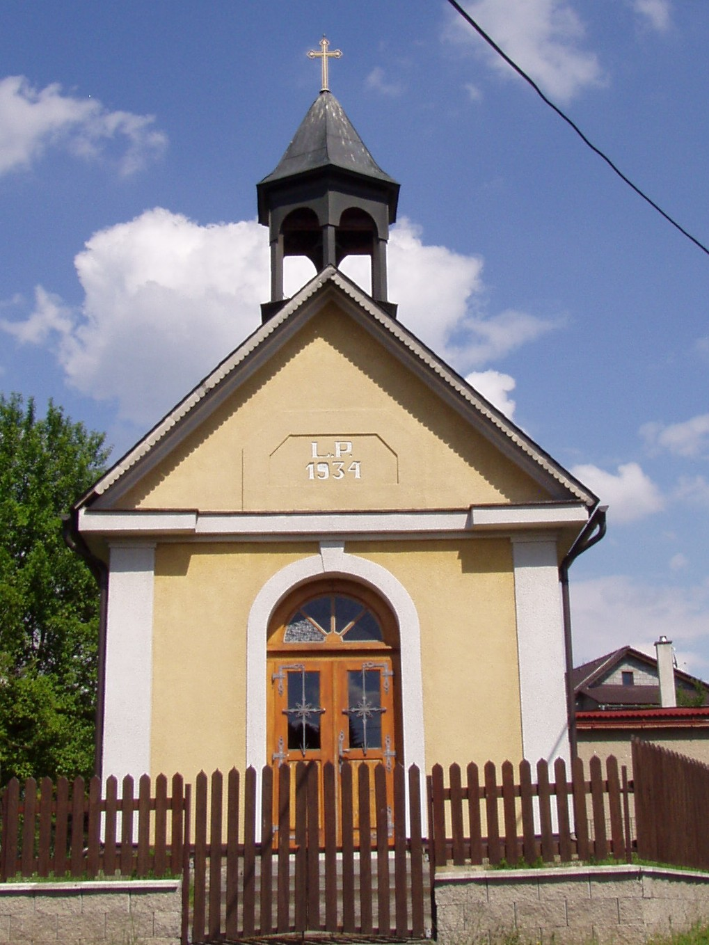 Kaple sv. Jana Nepomuckého v Havlovicích